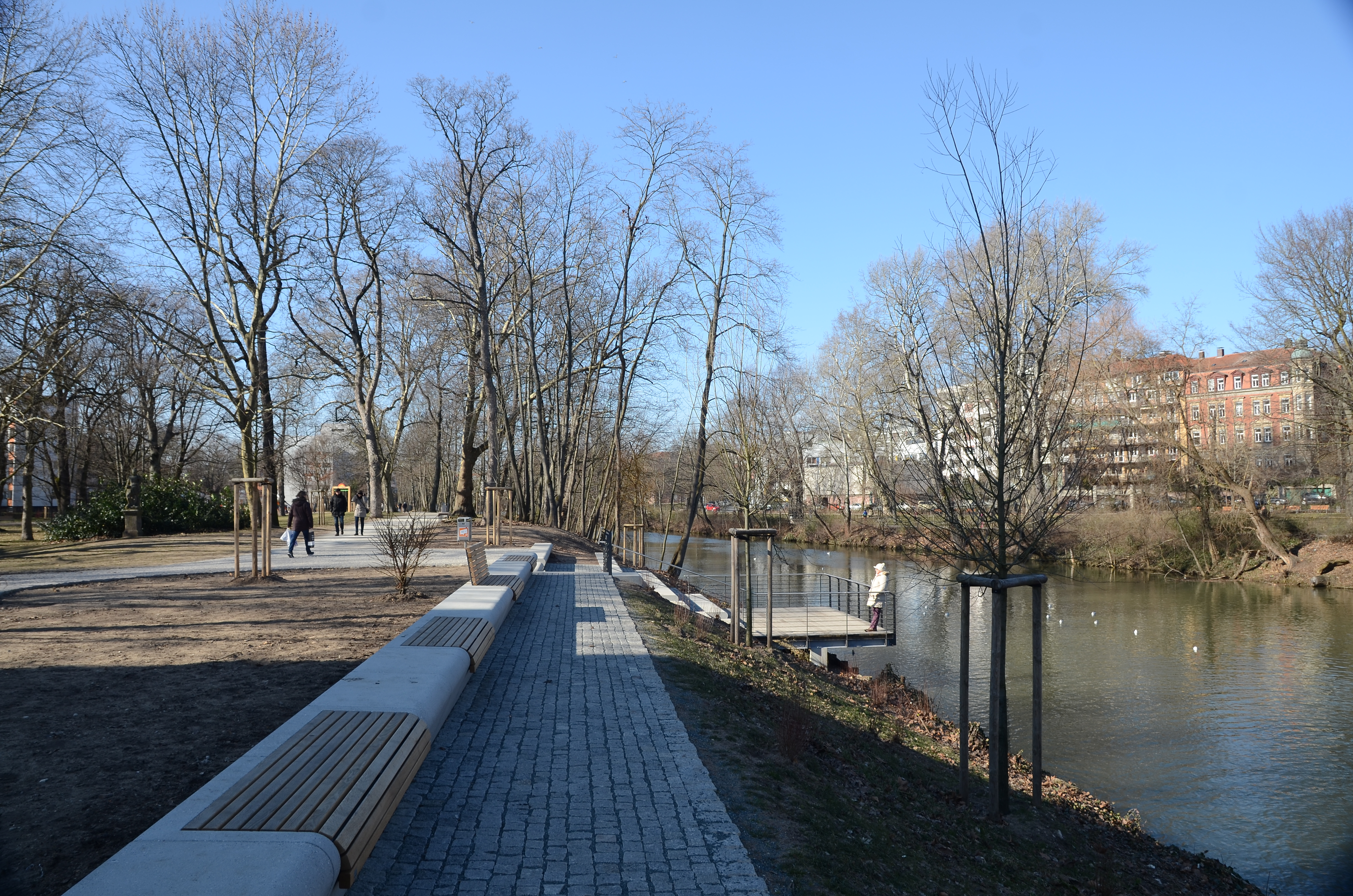 Kontumazgarten nach der Umgestaltung